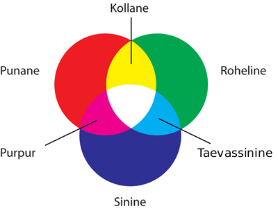 RGB värvimudel